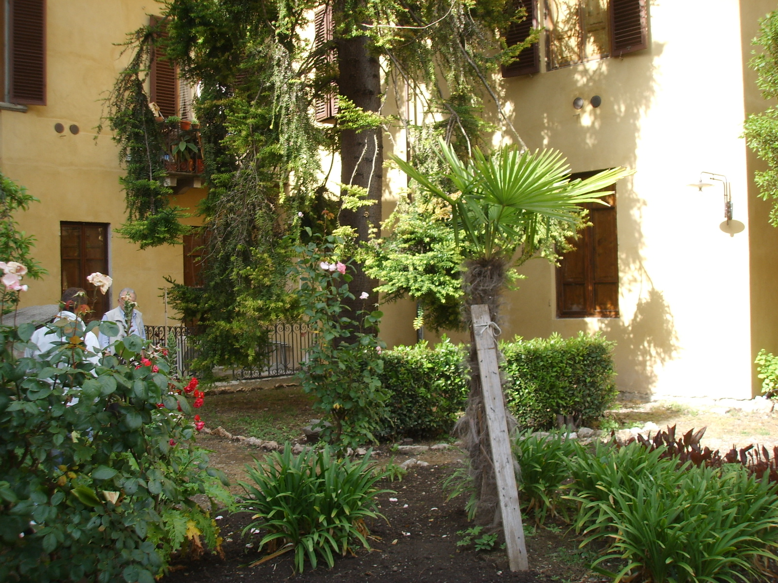 Palazzo della Magione del Tempio. giardino 04.JPG